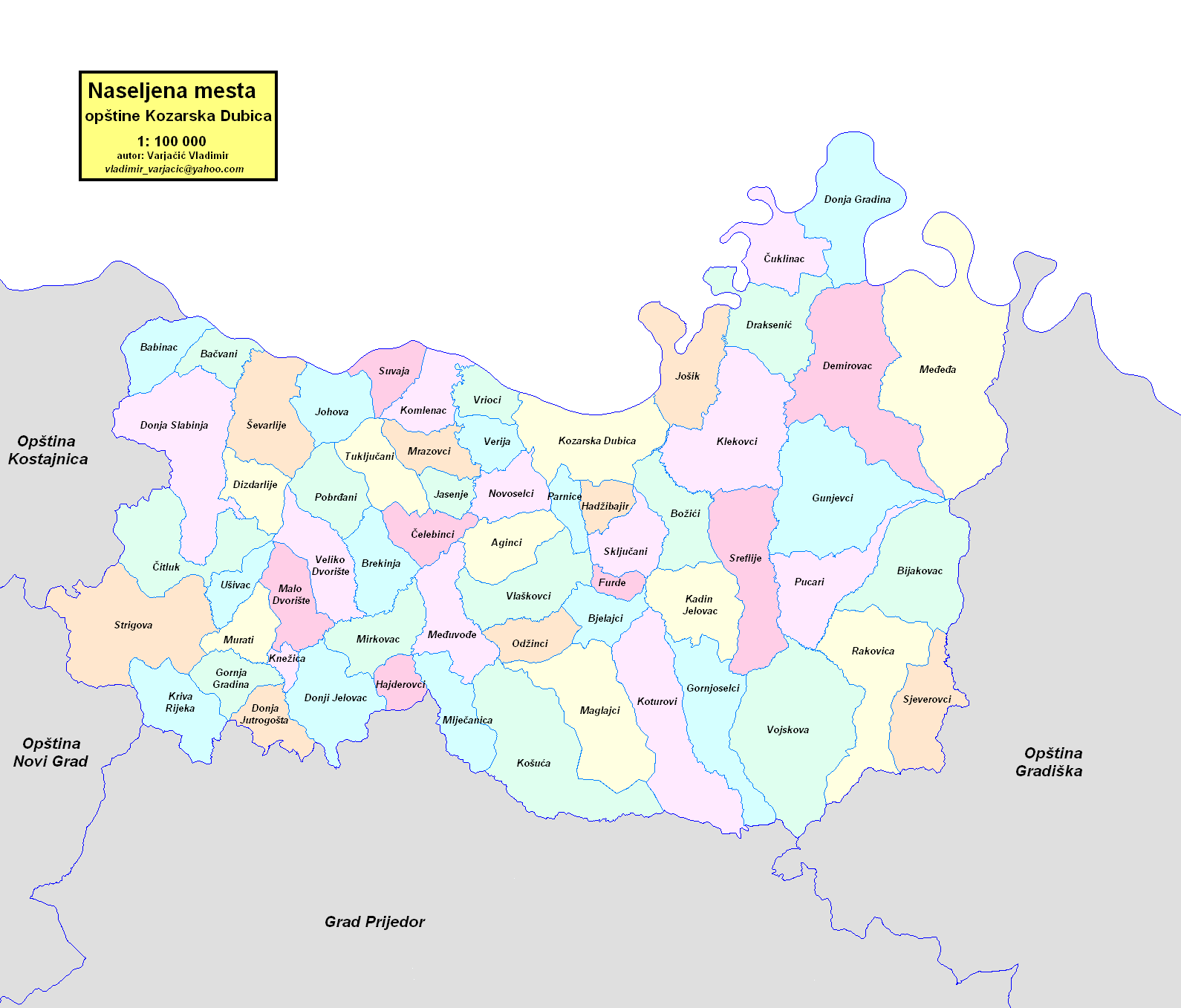 Opština Kozarska Dubica